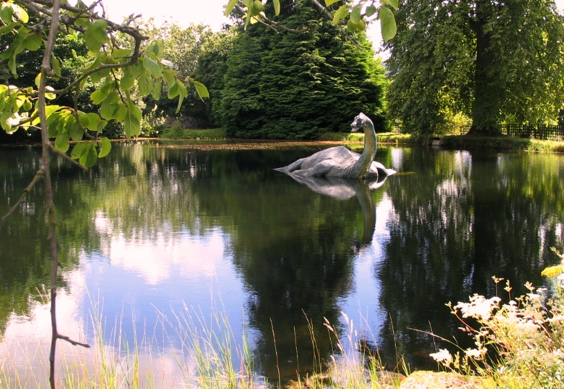 foto van Nessie in Drumnadrochit - wie twijfelt nu nog?